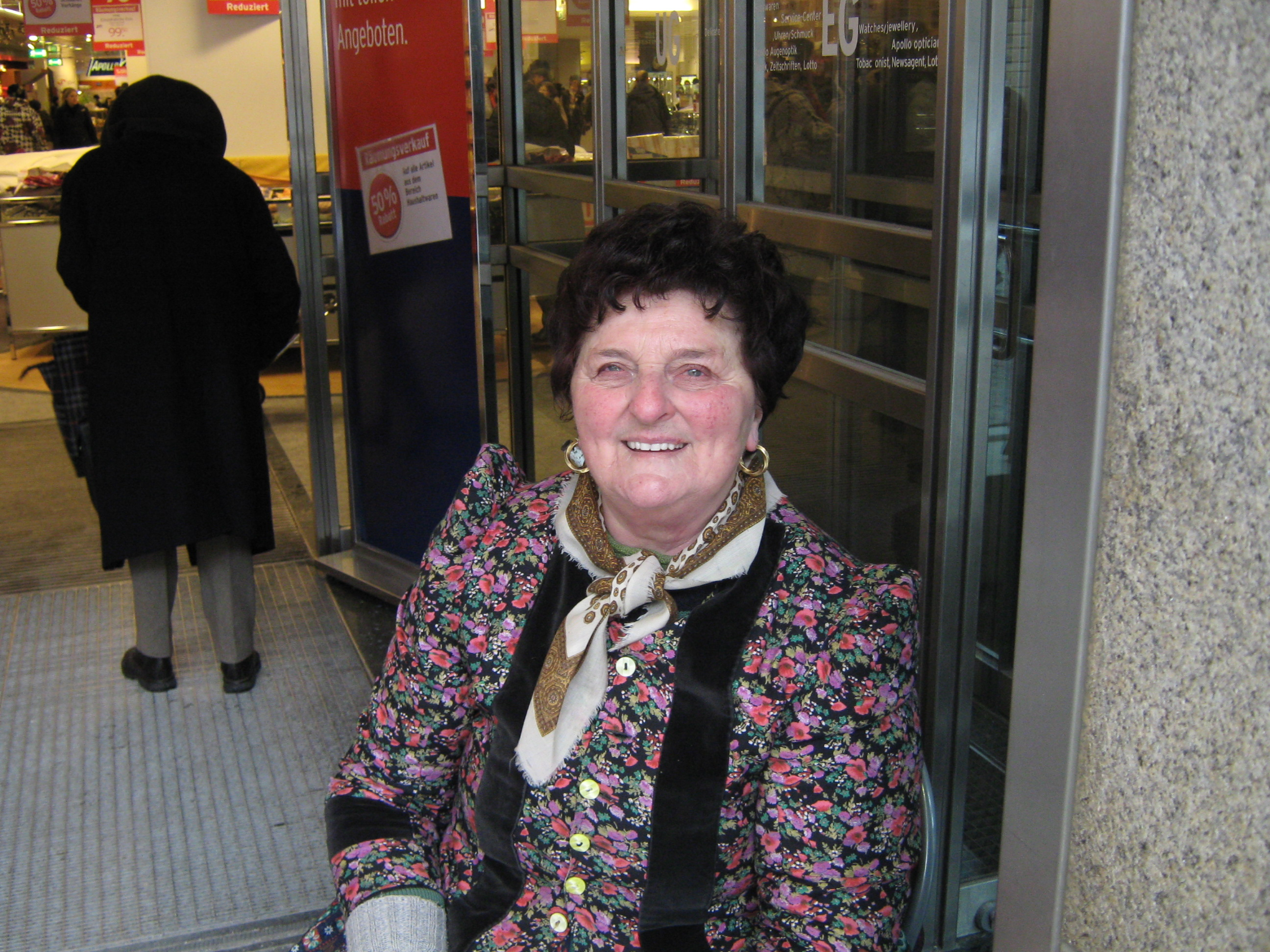 Helga Kraus am 3. März 2010, ihrem letzten Arbeitstag als letztes Krenweiberl, in München, Neuhauser Straße, rechts vor dem Eingang zum Kaufhaus Karstadt (danach abgerissen und ersetzt durch das Joseph-Pschorr-Haus)